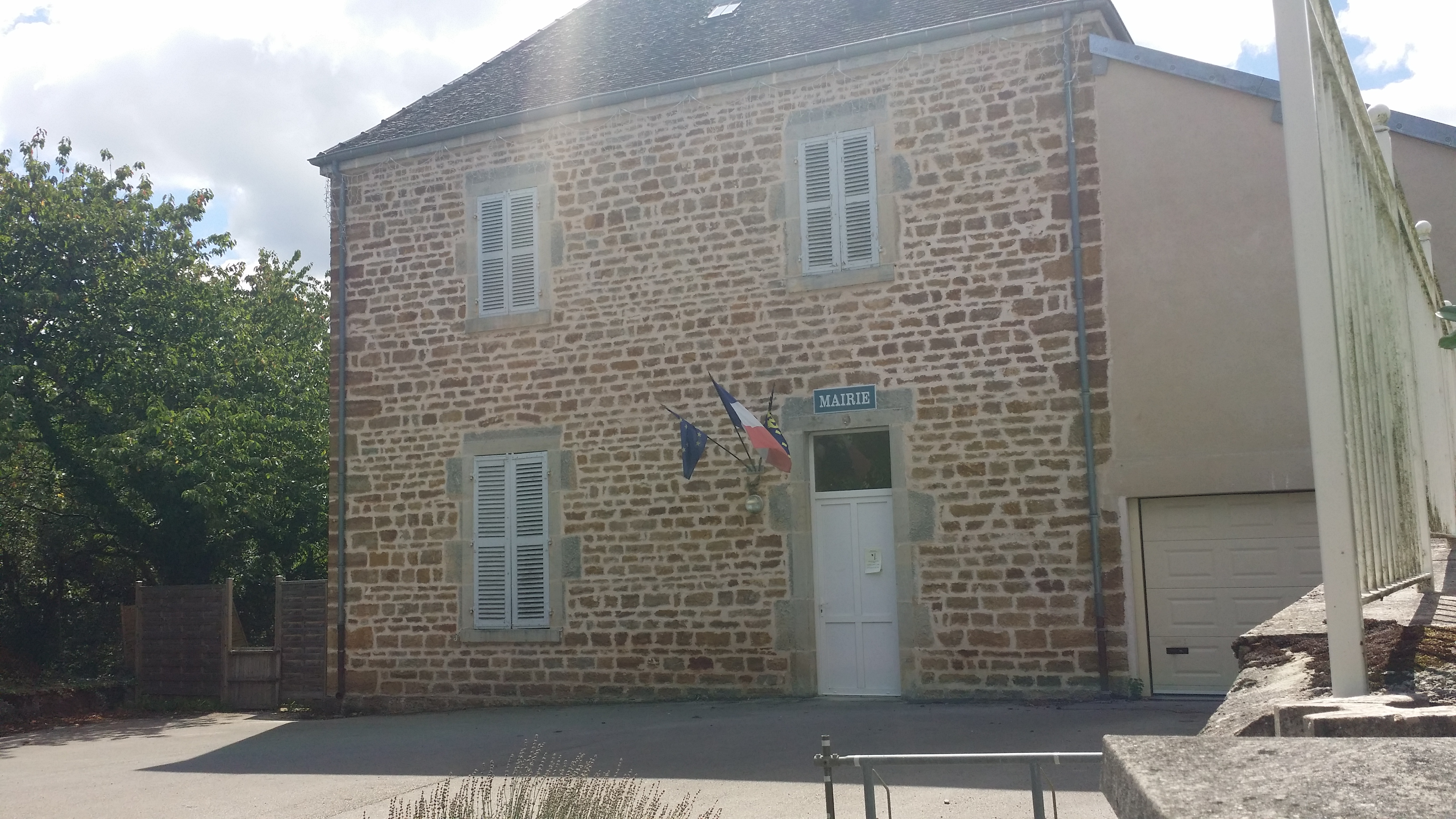 Mairie